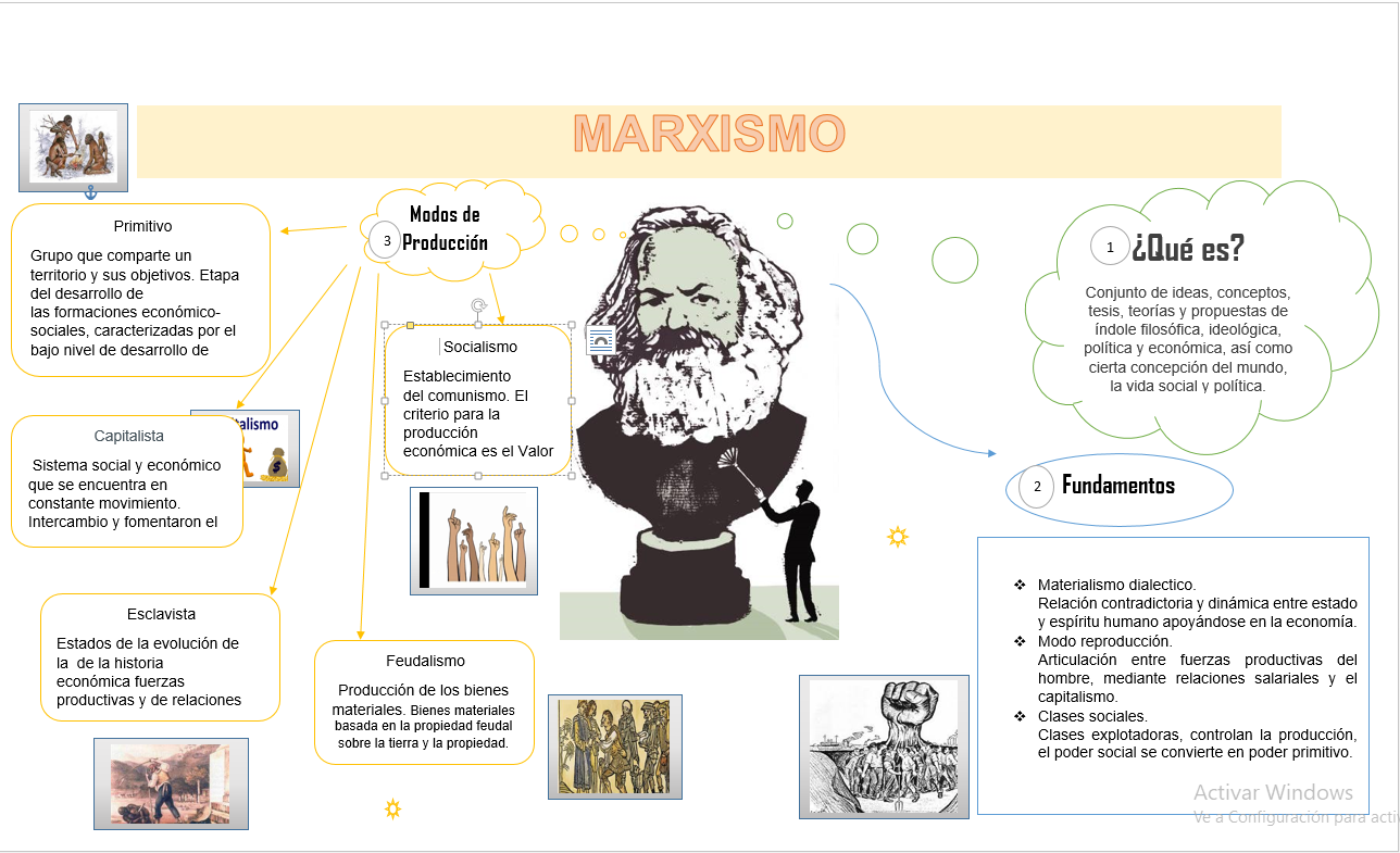 Bueno en la siguiente infografía hablaremos del marxismo ya que cada uno de sus fundamentos y sus modos de producción se pueden identificar con lo que ha ocurrido lo lago de la historia y en su evolución. Llevaremos a cabo el conjunto de ideas, conceptos, tesis, teorías y propuestas de índole filosófica, ideológica, política y económica del Marxismo.